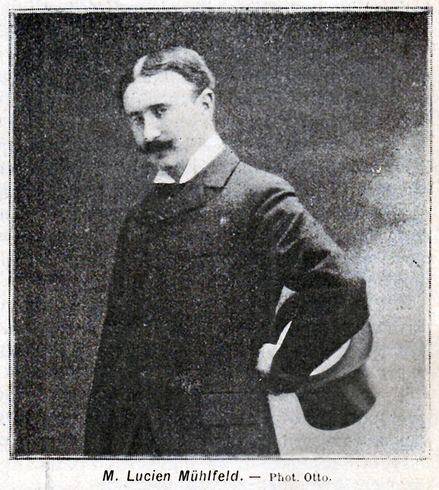 Lucien Muhlfeld